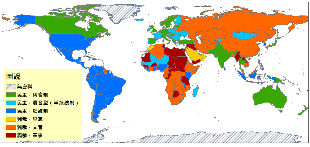 世界各政體的分類，民主的再細分成：议会制、混合型（半总统制）、总统制；独裁的再細分成：皇家、国家非军事、军事。 引用來源：Cheibub, José Antonio, Jennifer Gandhi, and James Raymond Vreeland. 2010. “Democracy and Dictatorship Revisited.” Public Choice, vol. 143, no. 2-1, pp. 67-101. 原資料集包括202國家從1946或該國政體獨立的年開始到2008年 此圖僅呈現2008年資料，由zh:User:hanteng繪製